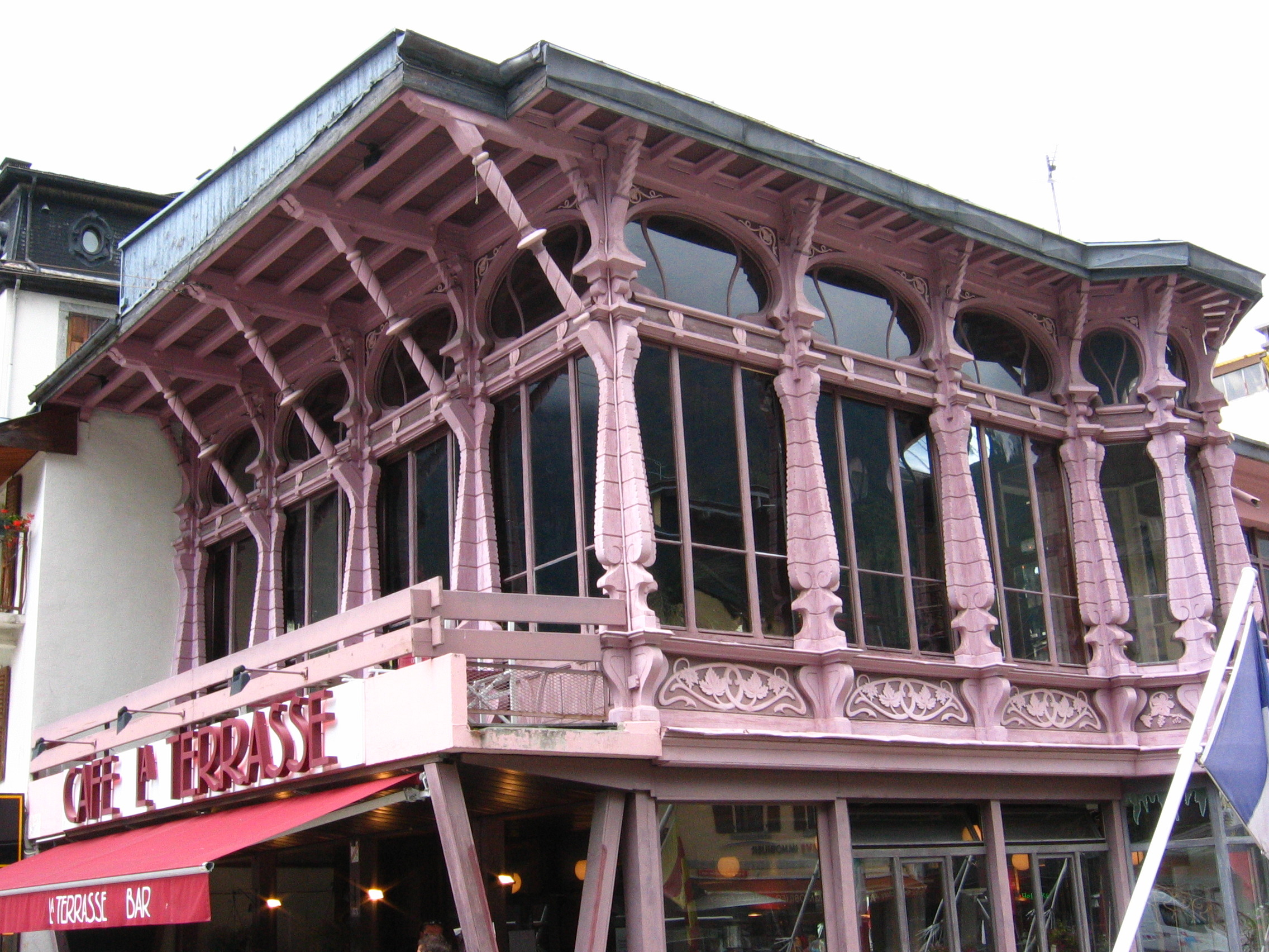 Chamonix, façade Art nouveau